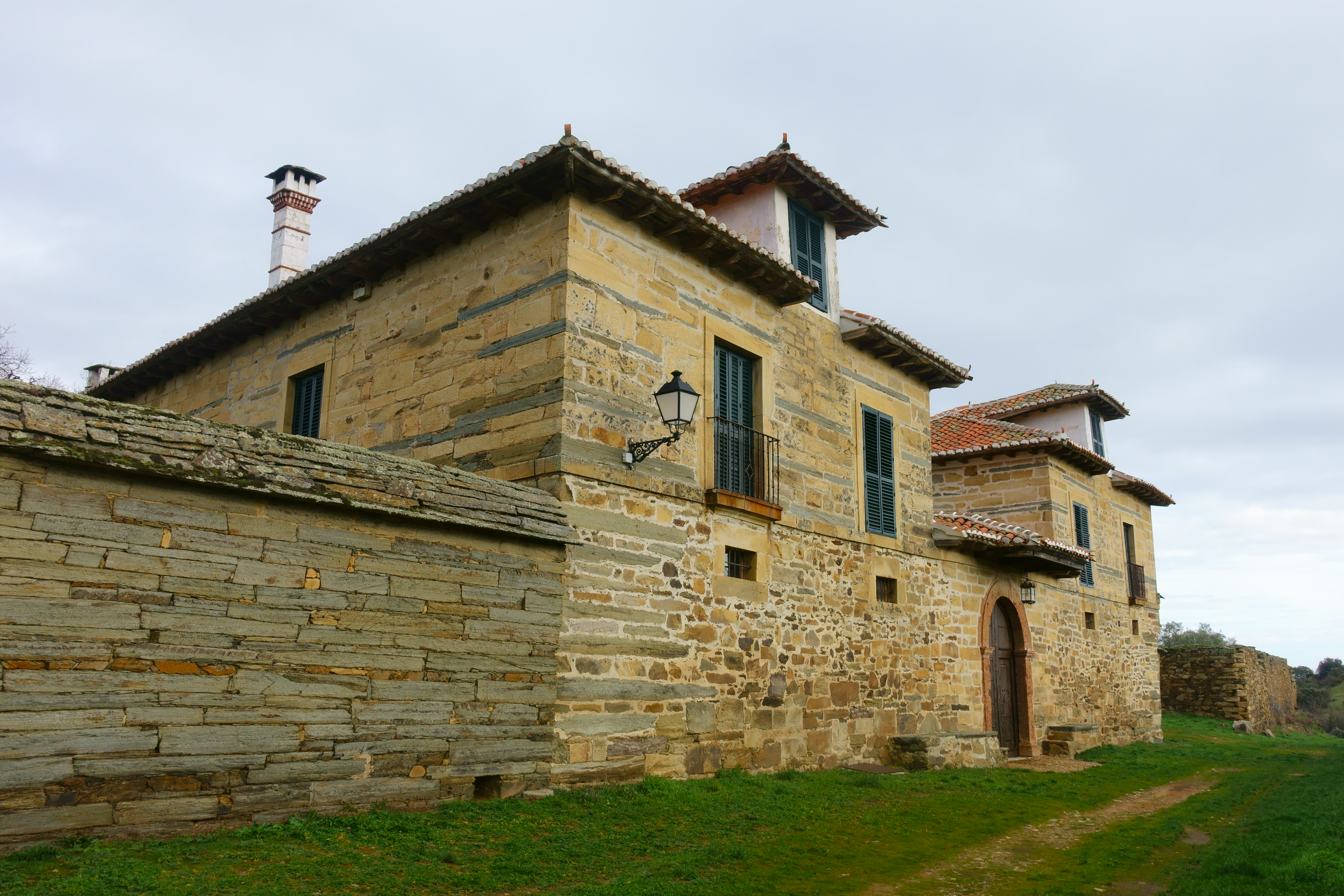 Casa de Santiago Alonso Cordero en el barrio de Arriba de Santiago Millas (León, España).